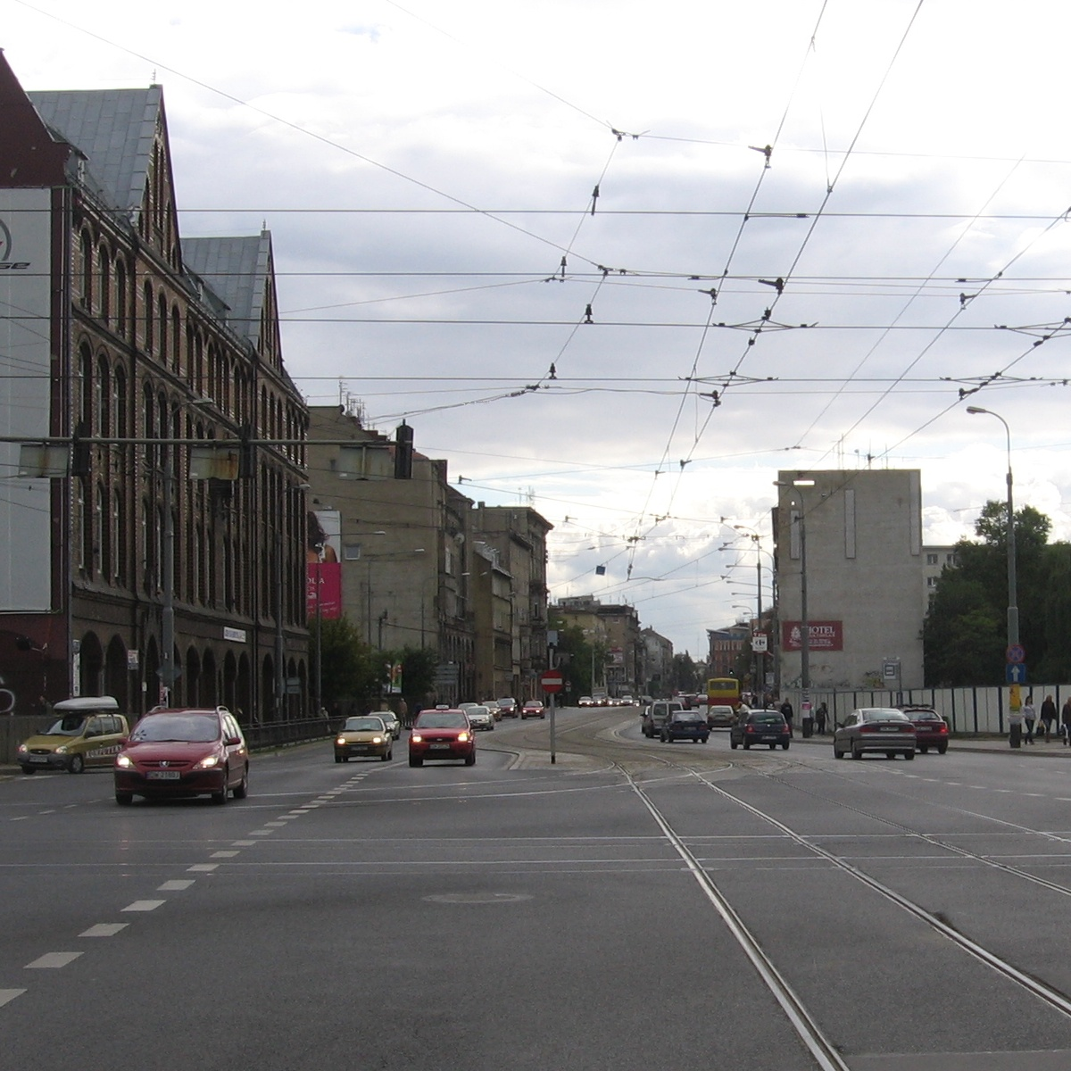 ulica Piotra Skargi we Wrocławiu - widok z pl. Dominikańskiego w kierunku południowym, po prawej ogrodzony parkanem plac, gdzie mieściła się drukarnia prasowa, po lewej ceglany budynek IX Liceum Ogólnokształcącego, w głębi w osi ulicy słabo widoczny zarys jasnego budynku dworca Wrocław Główny